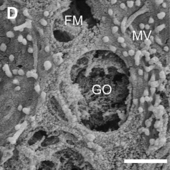 Fig 4. Visualización de la producción de moco y células caliciformes en la monocapa derivada de colonoides caninos. D) Una imagen SEM de una célula caliciforme en la superficie celular apical. Una gran ampliación de un orificio de célula caliciforme (GO), una membrana fenestrada (FM) que se extiende profundamente dentro de la célula y microvellosidades (MV). Barra de escala= 1 μm.